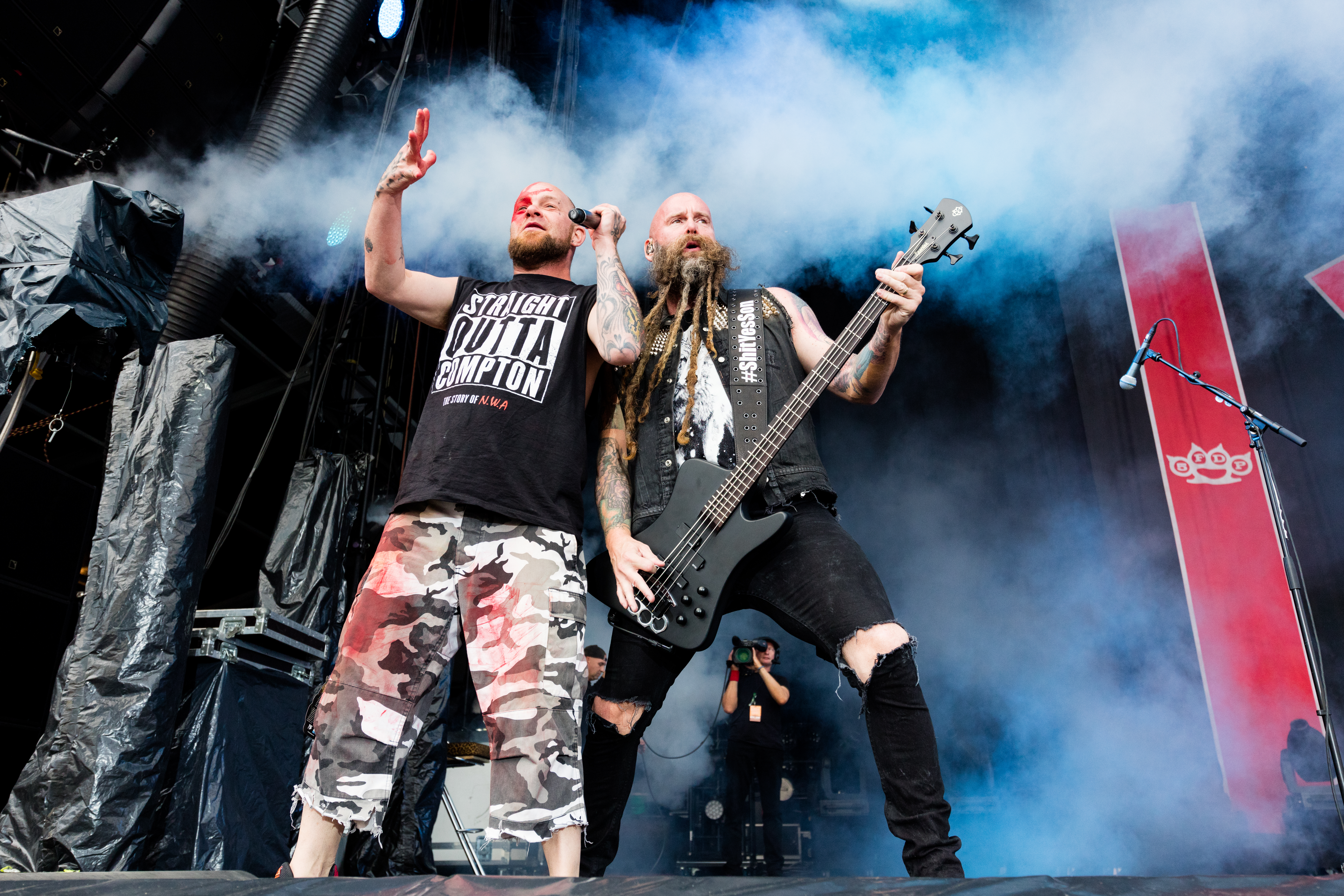 Five Finger Death Punch during Rock am Ring at Nürburgring, Nürnburg, Rheinland Pfalz, Germany on 2017-06-02, Photo: Sven Mandel